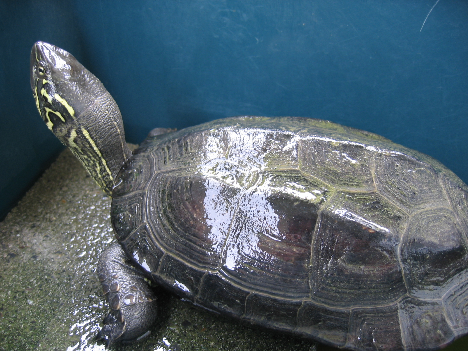 クサガメ (Chinemys reevesii)